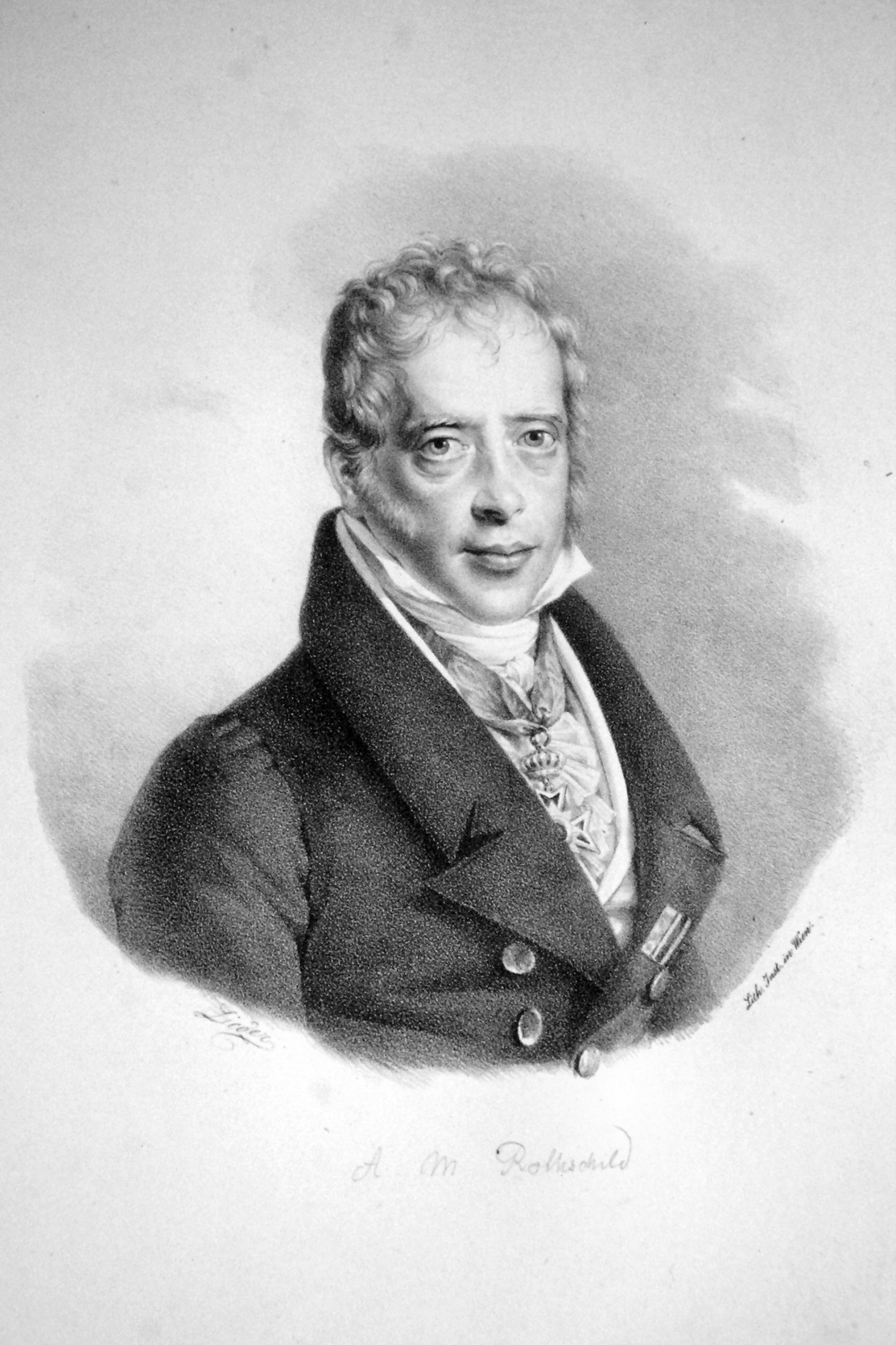 Amschel Mayer von Rothschild (1773-1855) Bankier. Lithographie von Friedrich Lieder, um 1830